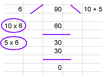 delen